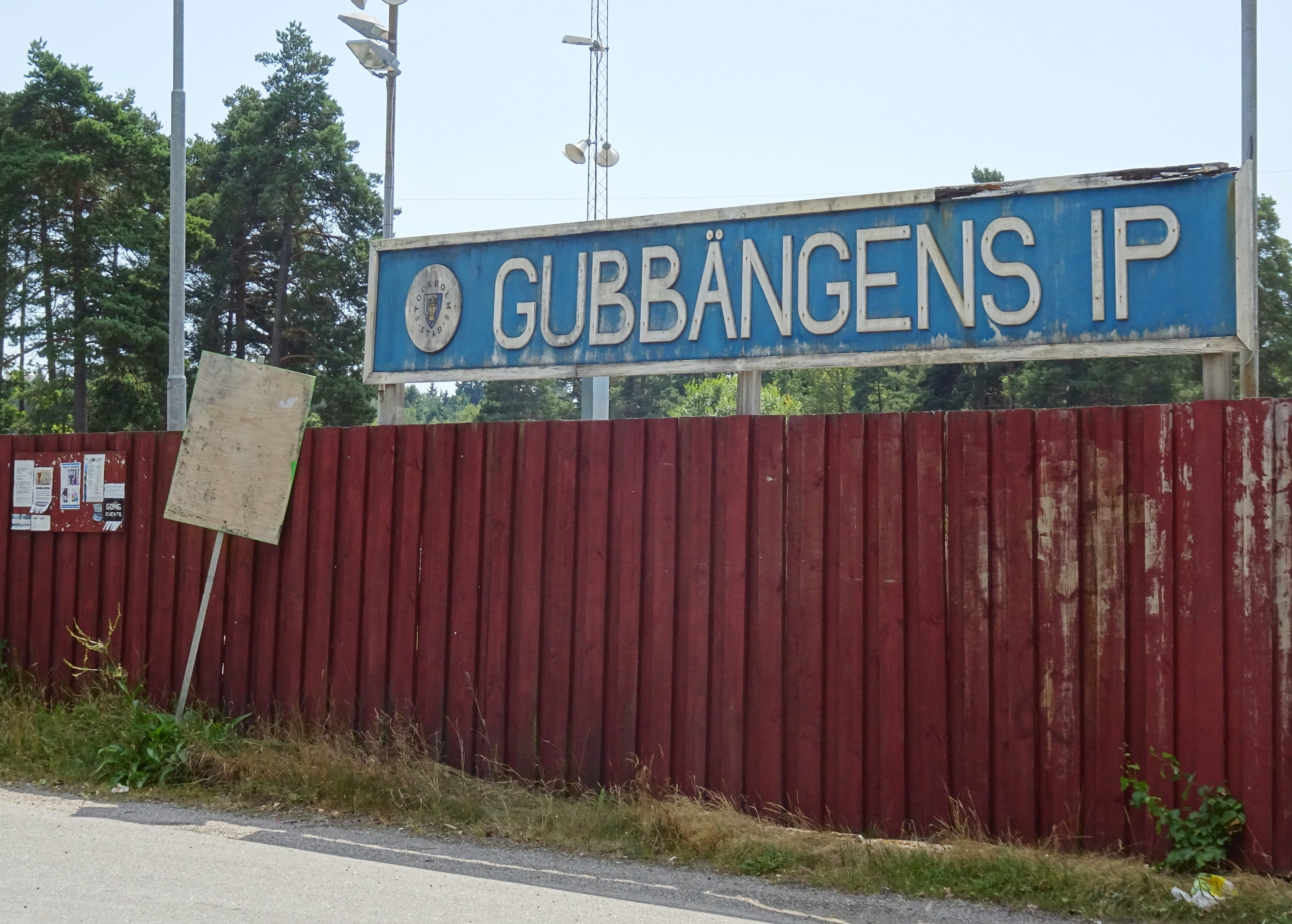 Gubbängens IP